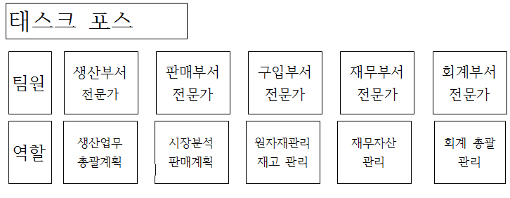 태스크포스2